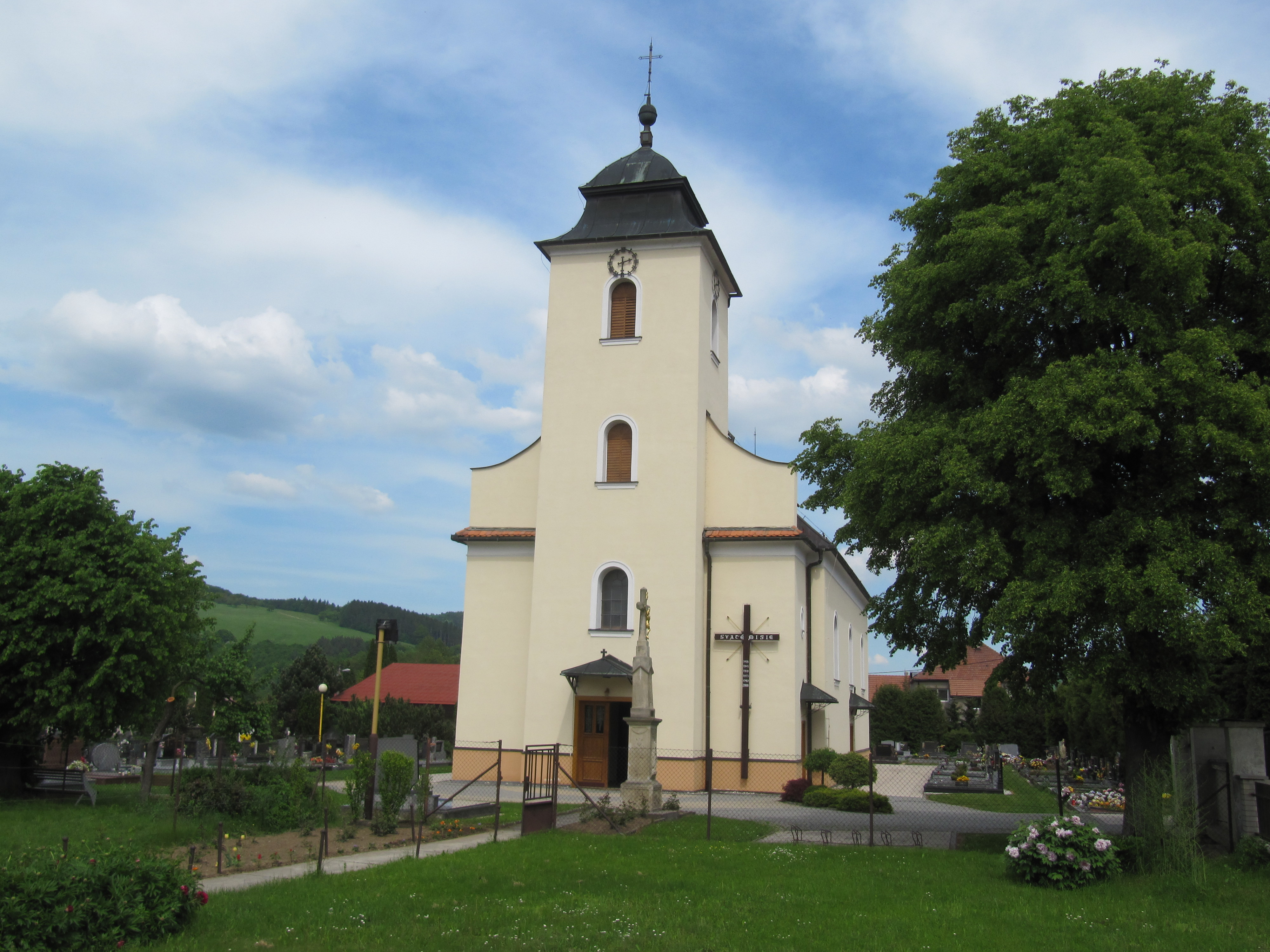 Kostel sv. Josefa (Štítná nad Vláří), Štítná nad Vláří